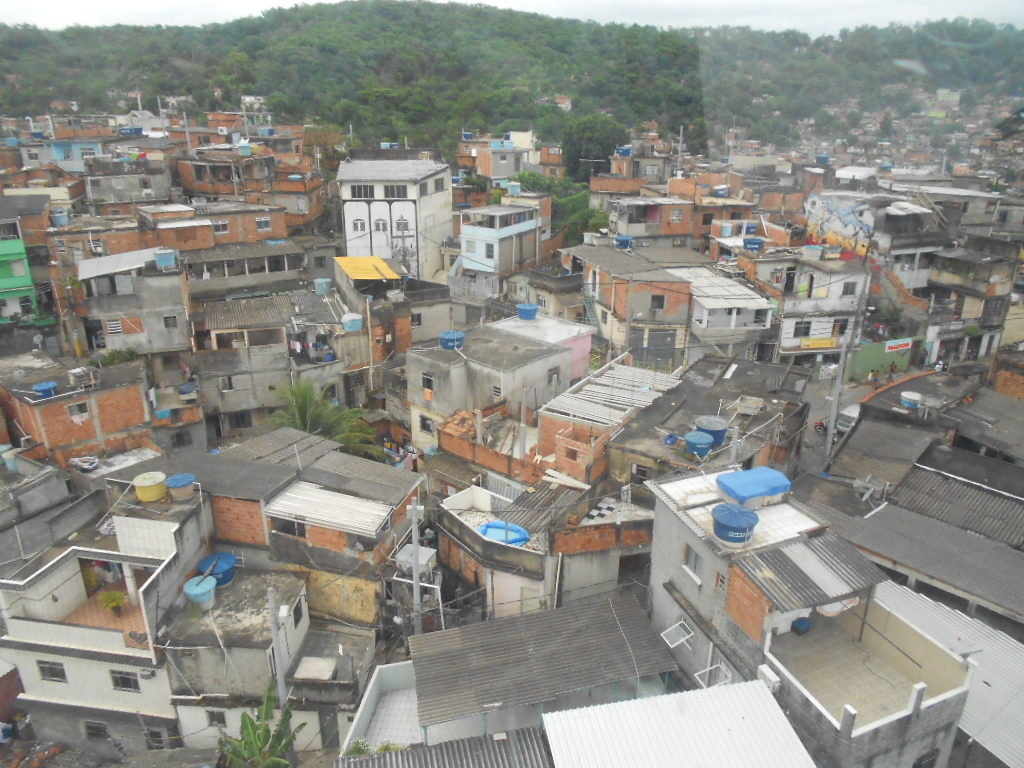 Vila Cruzeiro, vista do alto do bondinho do Alemão.